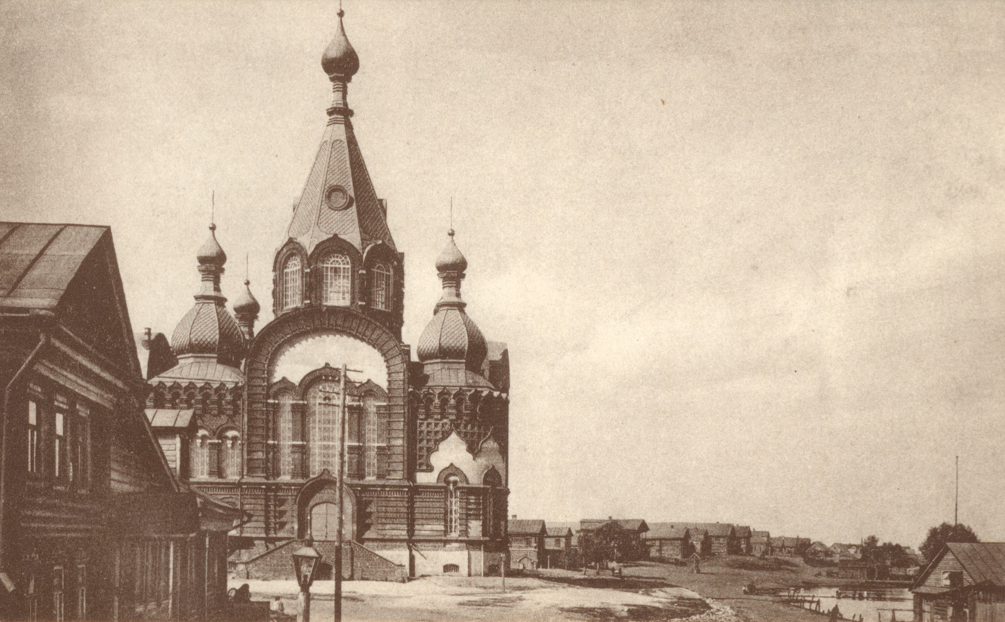 Храм Владимирской иконы Божьеи Матери в Гордеевке, Нижний Новгород